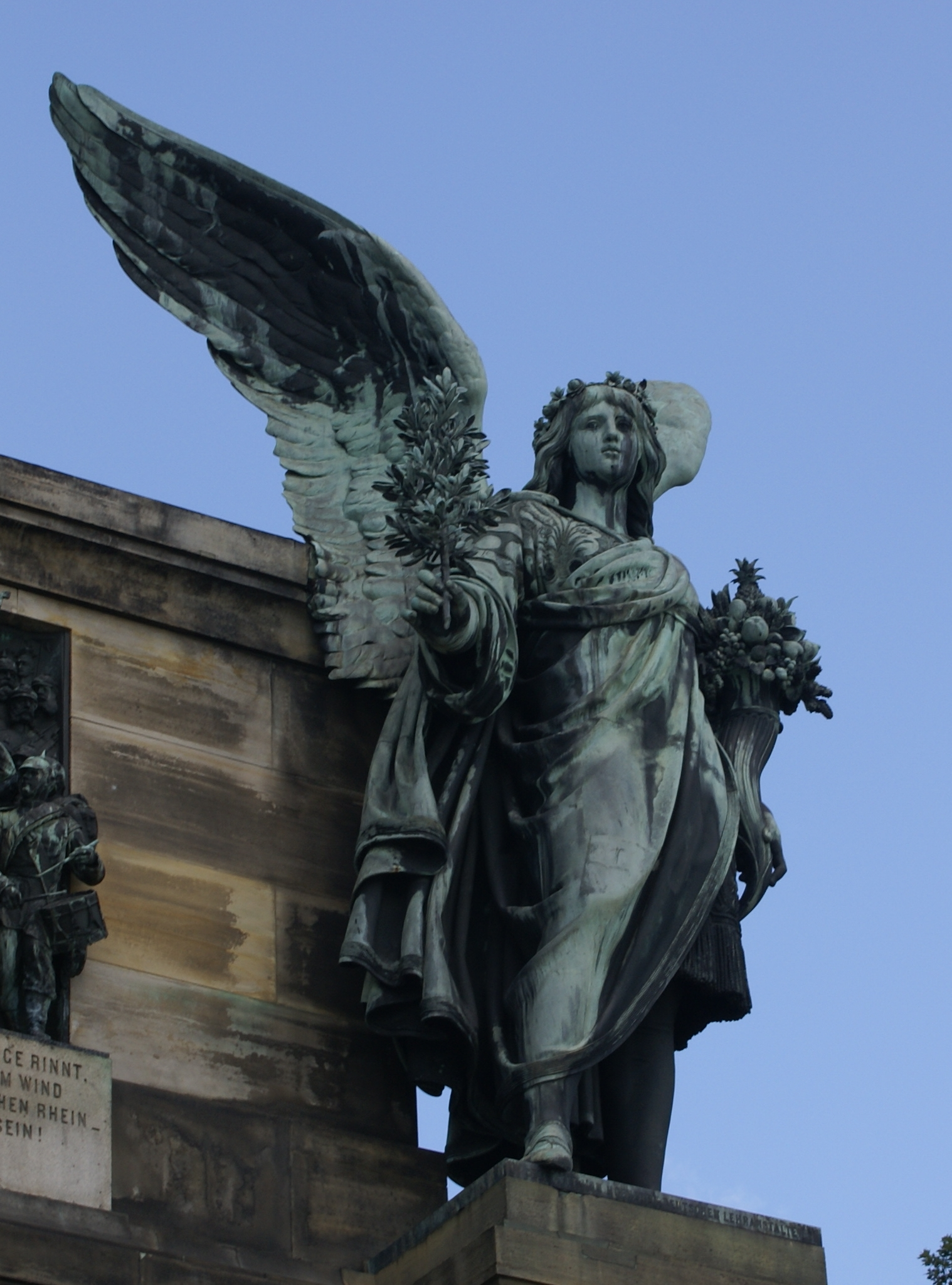 Die Figur des Friedens